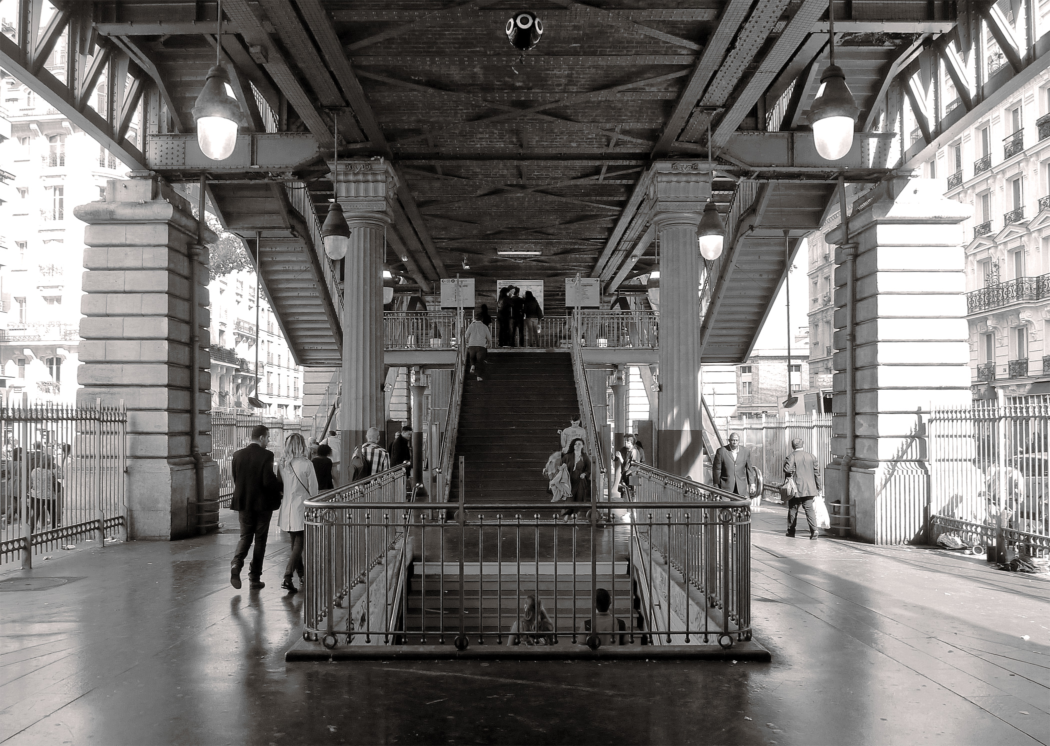 Station de métro Barbès-Rochechouart - Paris 8-9-18